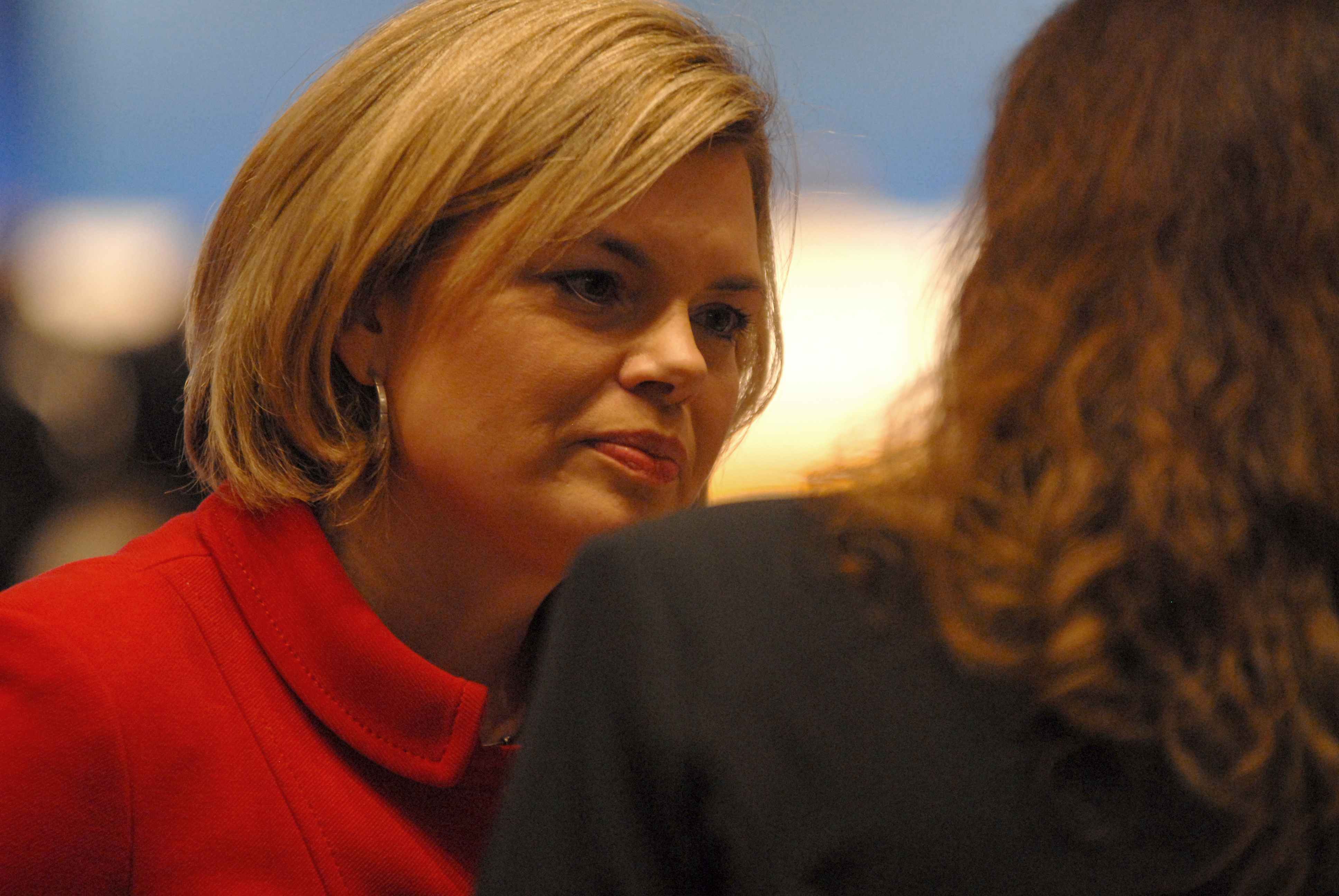 Julia Klöckner, Vorsitzende der CDU-Fraktion im Landtag Rheinland-Pfalz, auf dem CDU-Parteitag